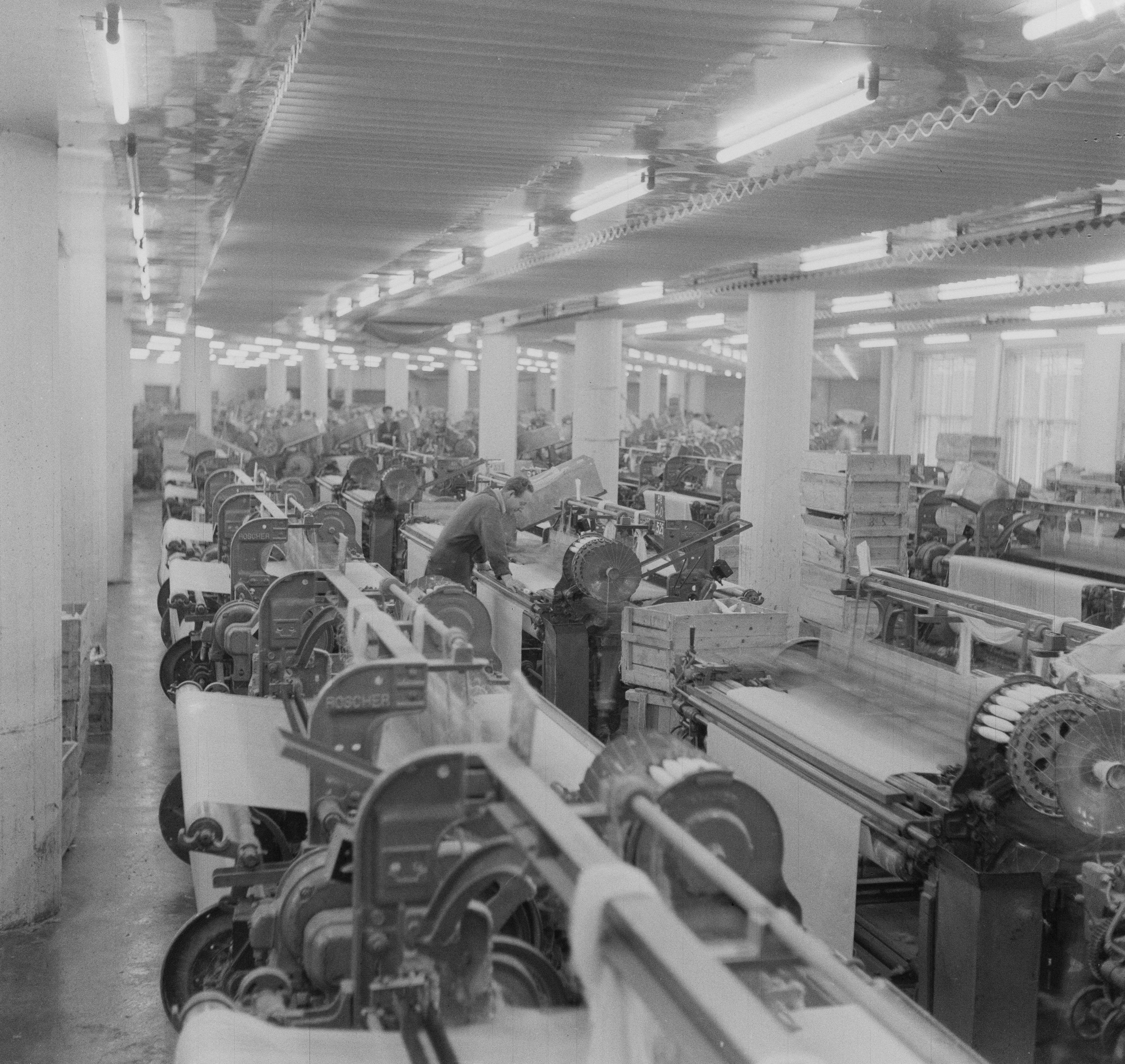 Bildet er hentet fra Arkivverket. Dale fabrikker I. NÅ nr. 25, 1953 Arkivinstitusjon : Riksarkivet Arkivnavn : Billedbladet NÅ Sted : Norge, Hordaland, Vaksdal, Dale Emneord: Industri, Arbeid, Næringsliv Avbildet